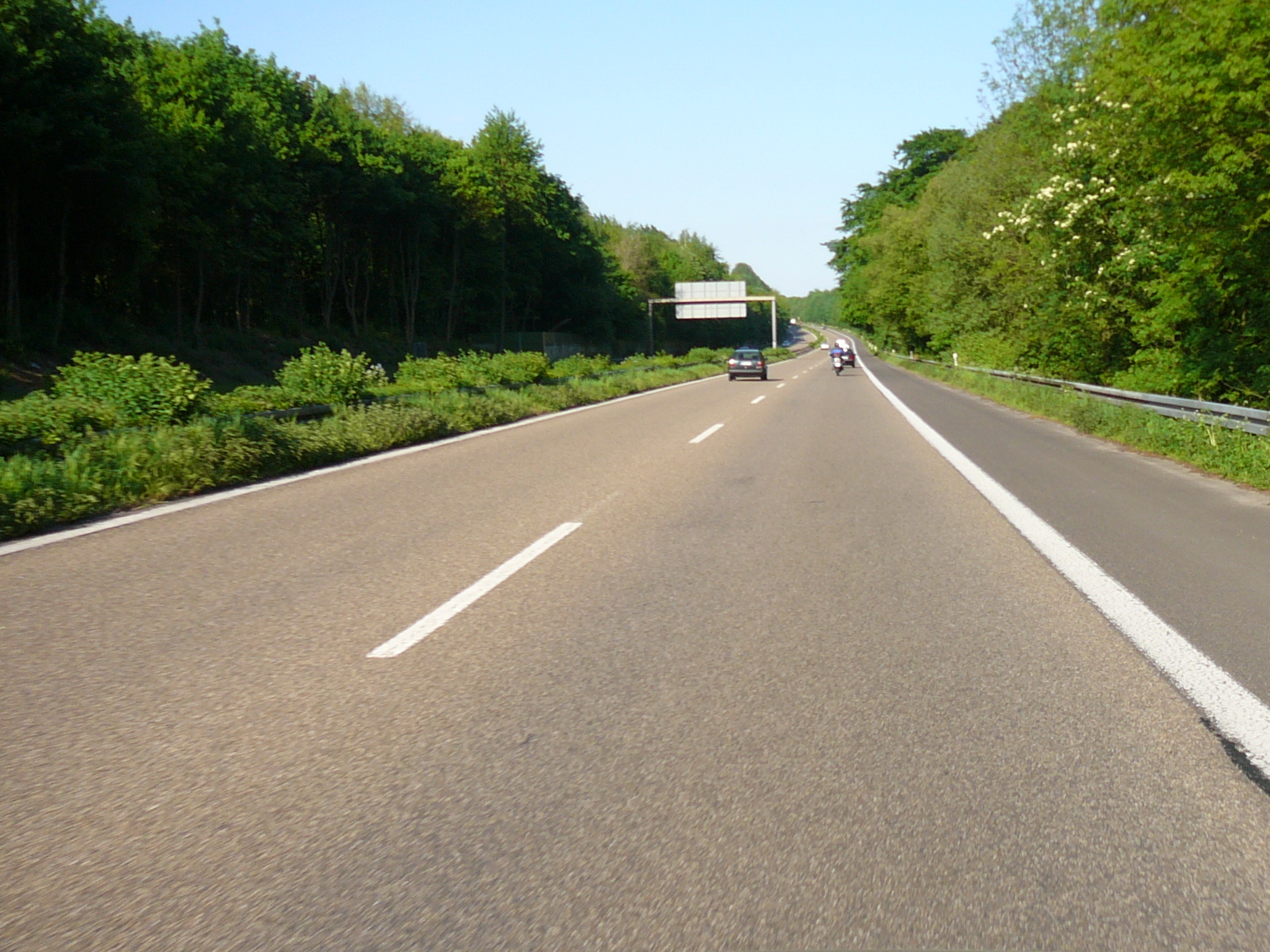 Landesstraße L 141n (Bundesautobahn 54), Solingen